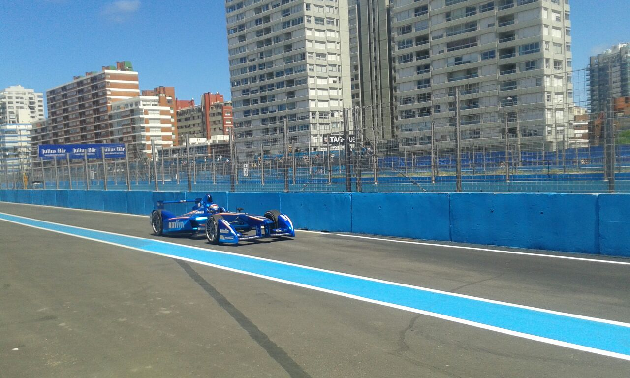 aaaaa